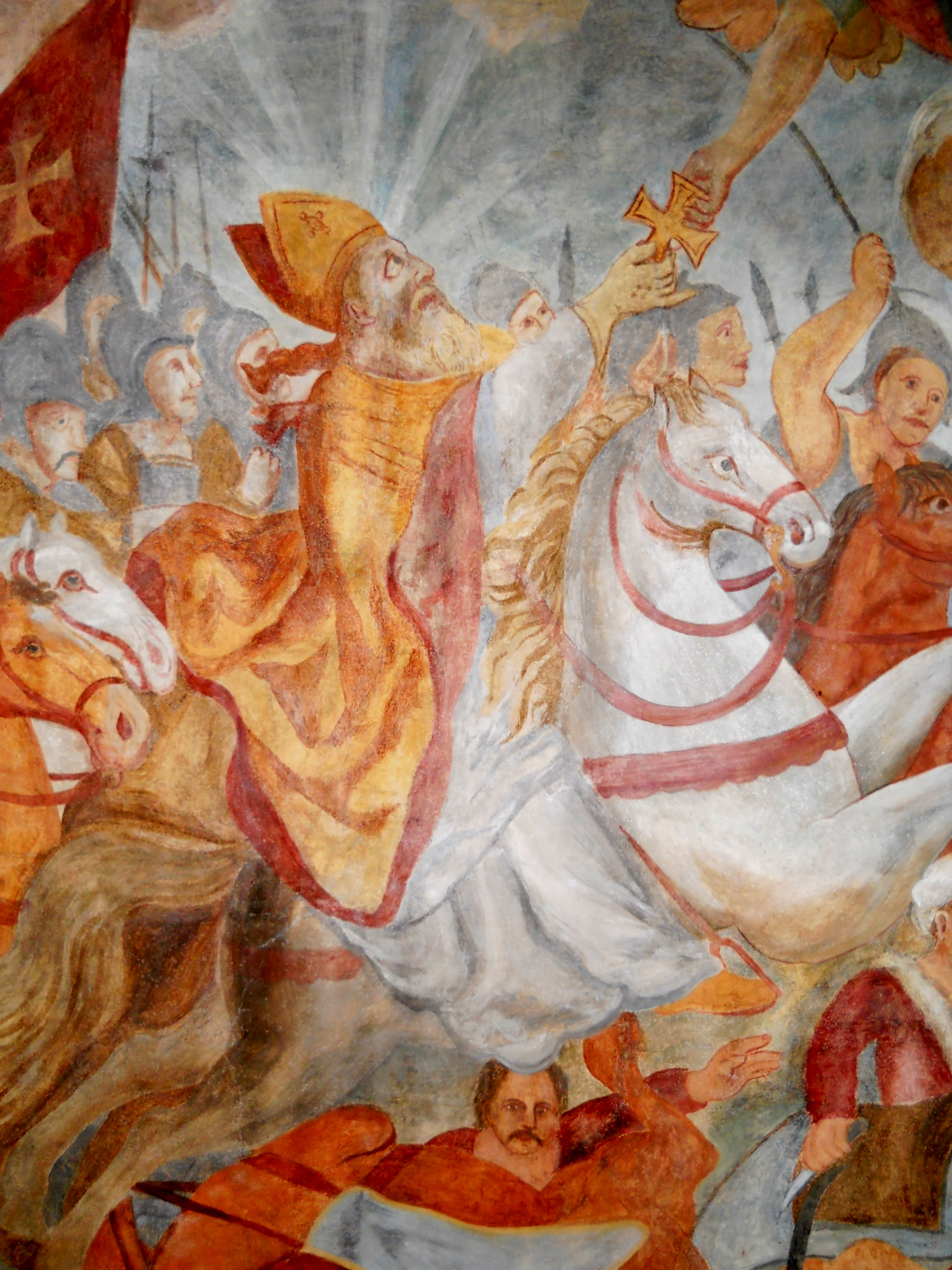 Der hl. Ulrich im Deckengemälde der Pfarrkirche St. Ulrich in Kevenhüll, Gemeindeteil von Beilngries im oberbayerischen Landkreis Eichstätt